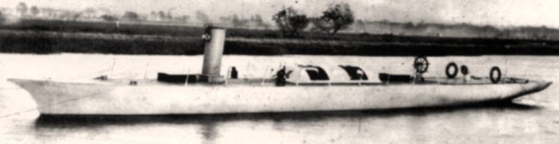 Construida por Astilleros Yarrow of Poplar, isle of Dogs, río Támesis, Londres, con el número de construcción 476. Llegó encajonada por partes, siendo armada en 1880 en Valparaíso. Era una torpedera de defensa de puerto. Tenía las dimensiones apropiadas para ser izada por los buques de la Escuadra y transportada a las áreas de operaciones. Su casco era de acero galvanizado y sus costados estaban provistos de refuerzos verticales con un arreglo especial para entalingar la embarcación sólidamente y poder izarla a pescantes de cubierta o costado. La proa estaba reforzada de modo que podía embestir una embarcación de igual porte o un poco mayor. Se podía transformar en una embarcación de transporte de pasajeros. Durante la Guerra del Pacífico se distinguió en 1880 en los ataques de lanchas en El Callao. En la Flotilla de Torpederas tenía el numeral 2. En 1883 fue transportada por ferrocarril a Puno y lanzada allí a las aguas del lago Titicaca, donde realizó operaciones de patrullaje con una tripulación de dos oficiales y 25 marinos, al mando del Teniente 1º Angel Custodio Lynch Irwing. La presencia de la torpedera en el lago impidió las comunicaciones lacustres y su uso para fines militares. Todas las embarcaciones peruanas que se habían refugiado en Chileyaca, se entregaron a las autoridades chilenas enbezadas por el Coronel Diego Dublé Almeida. Desarmada en 1885.